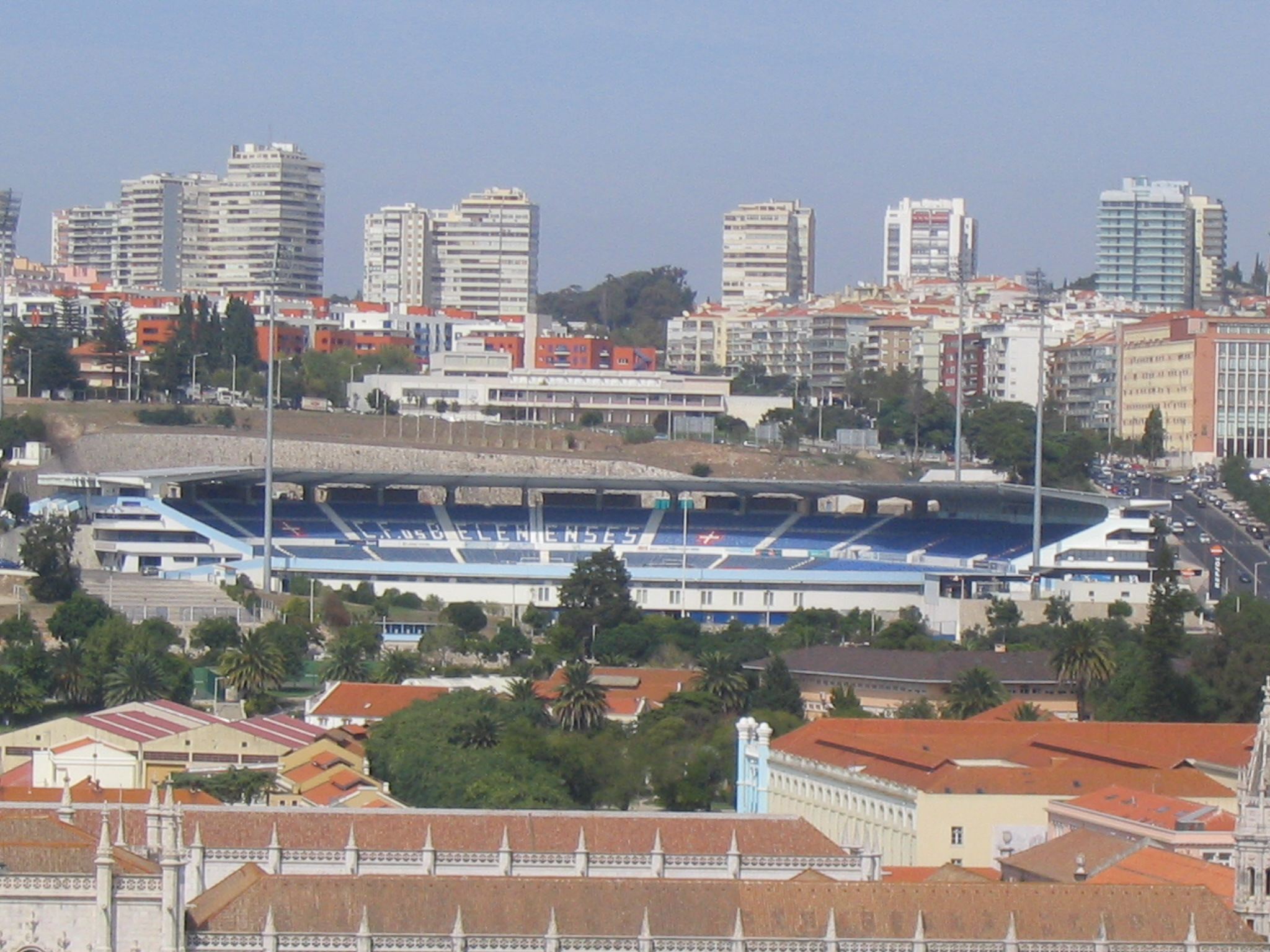 Estádio do Restelo des Clube de Futebol Os Belenense (Lissabon/P)